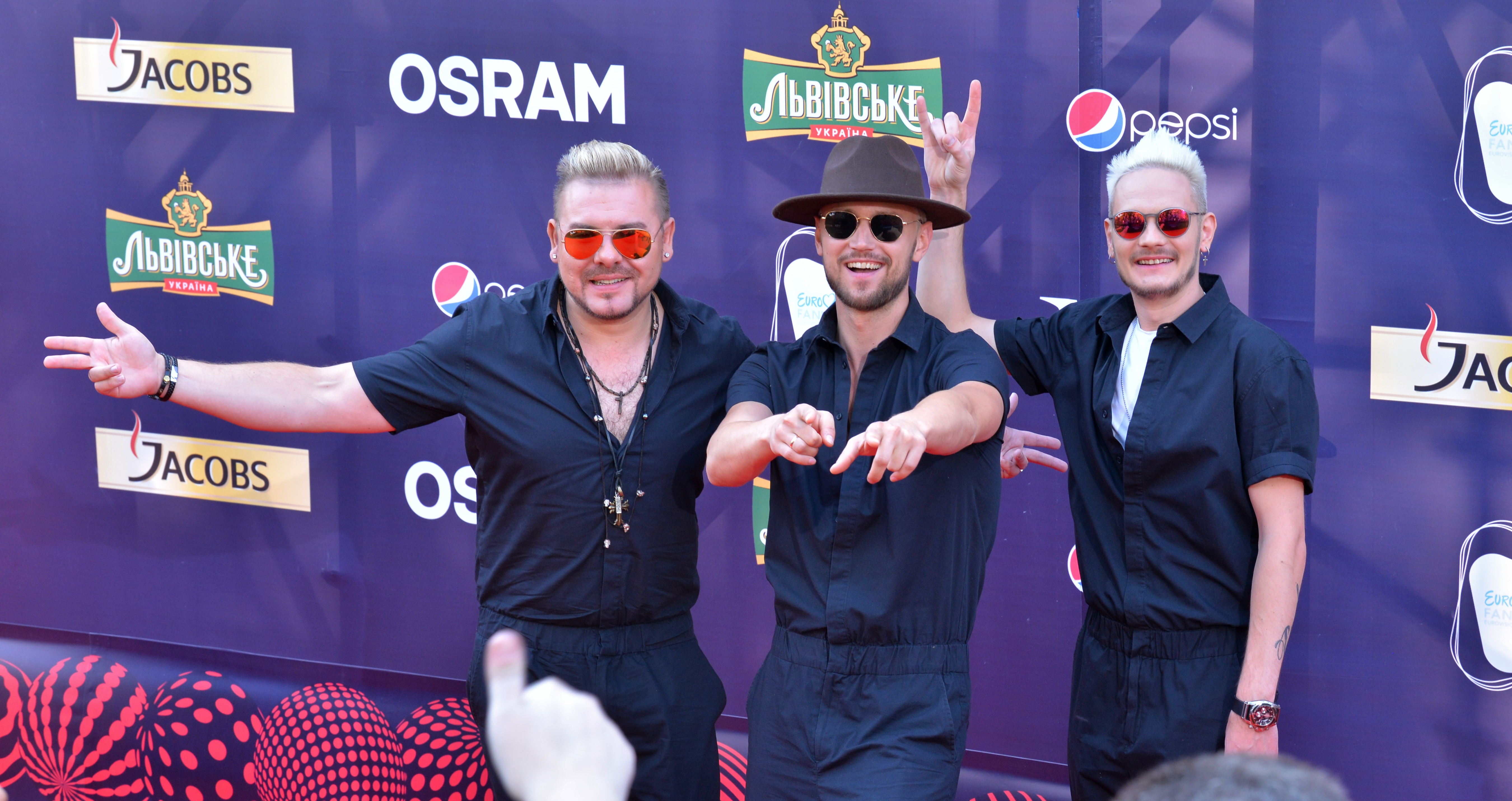 Молдовська група Sunstroke Project на церемонії відкриття пісенного конкурсу Євробачення 2017 у Києві